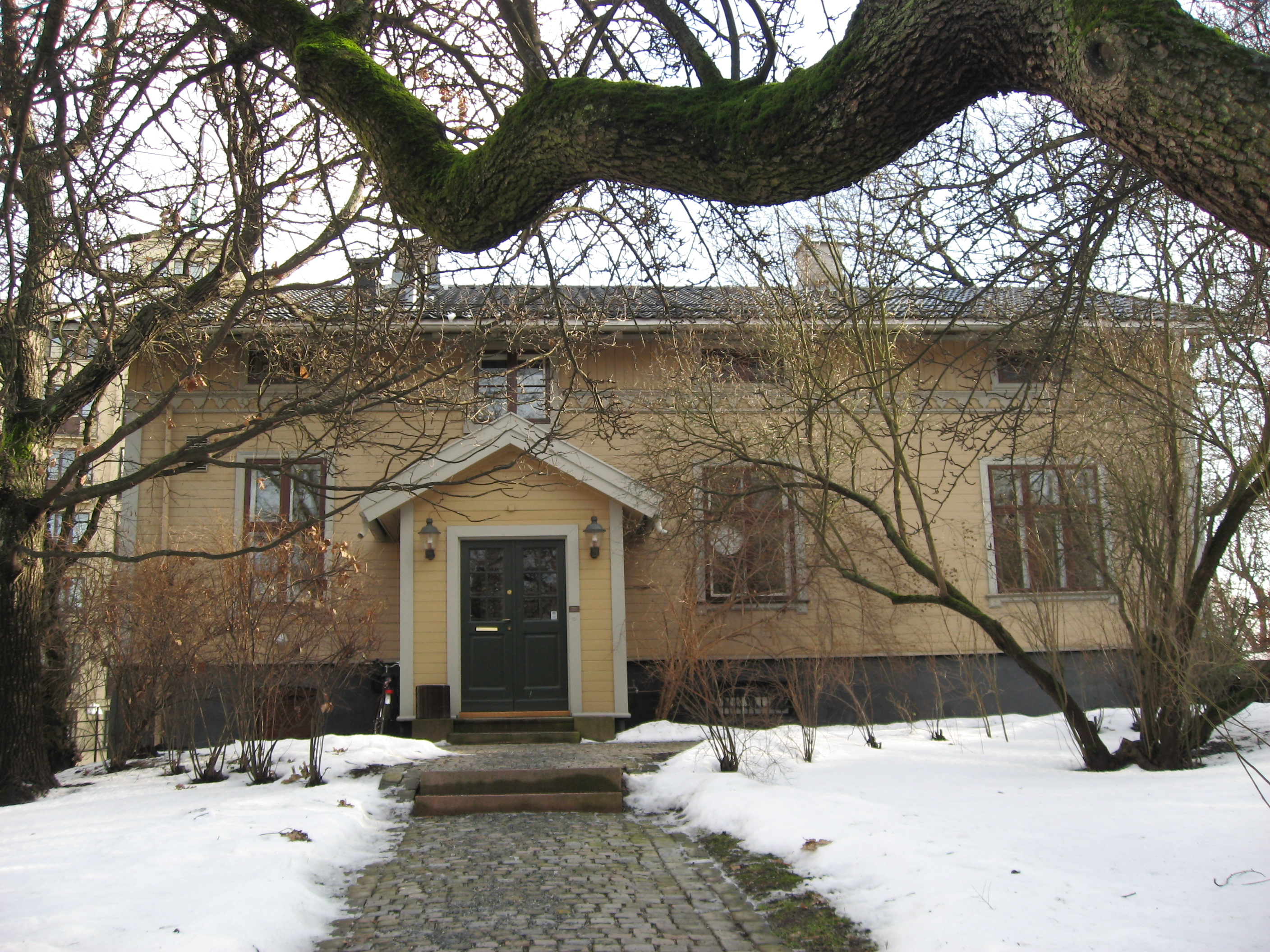 Wergelandsveien 2 in Oslo, Norway (Grotten) - Home of Henrik Wergeland